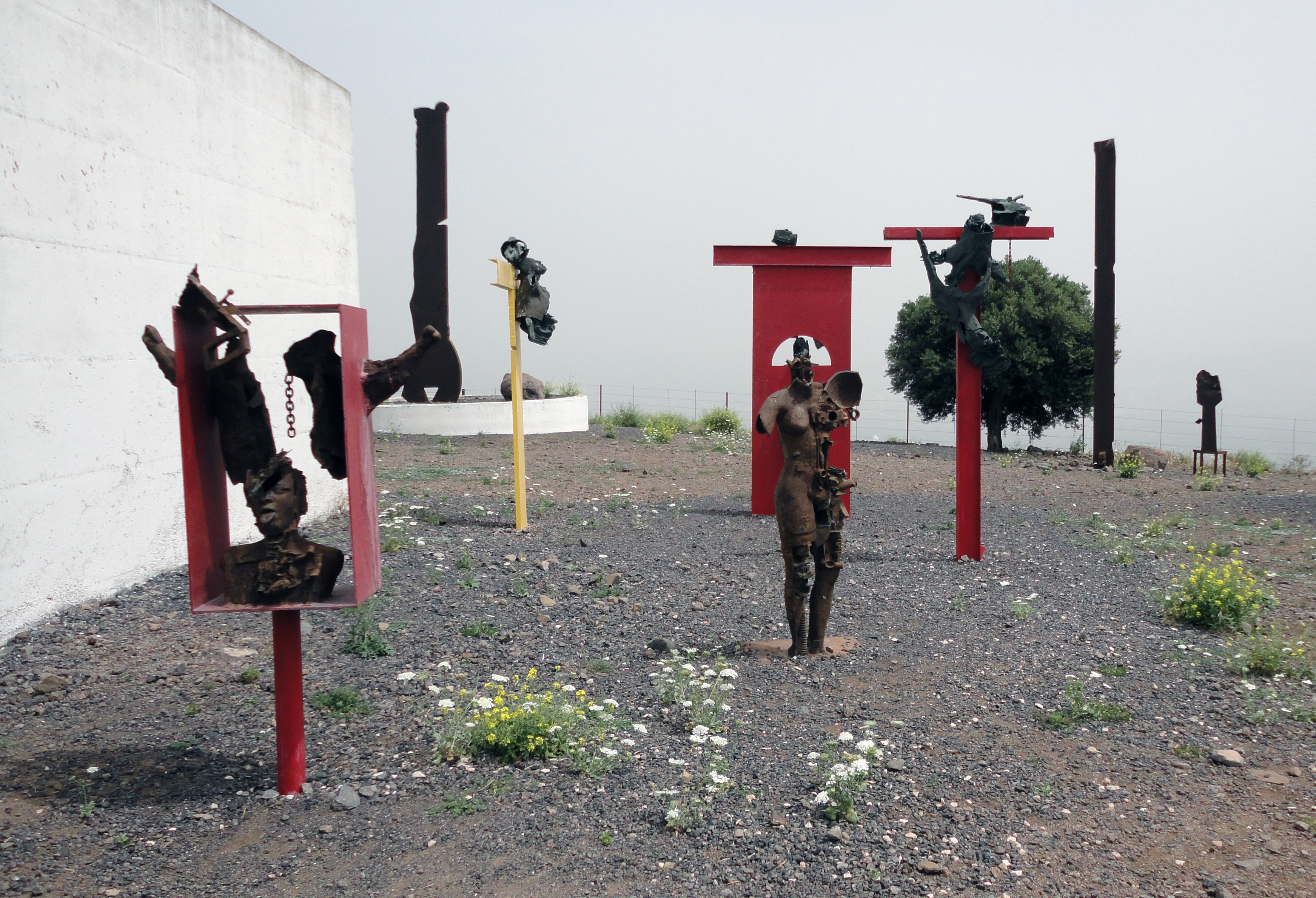 Sculpture